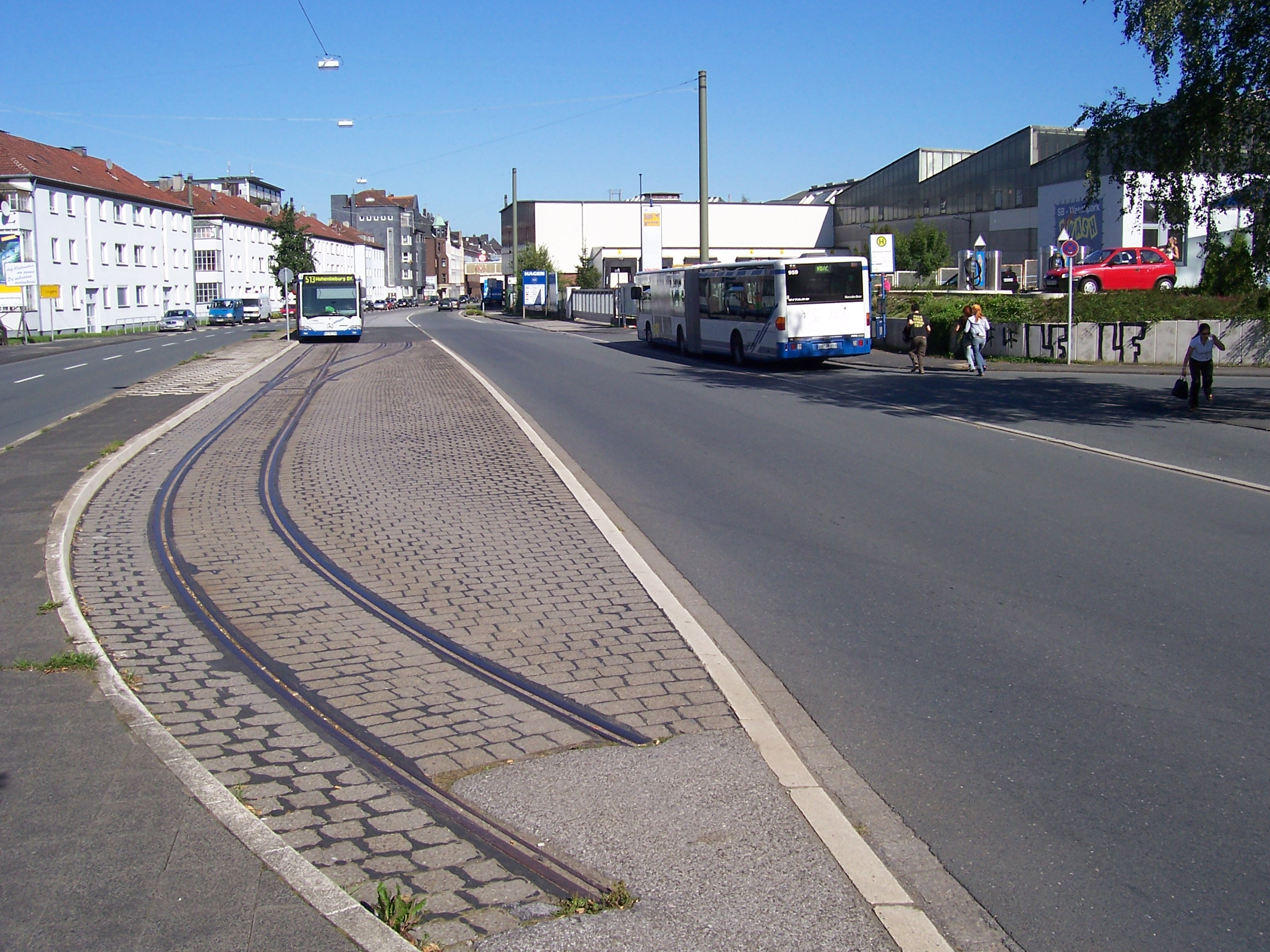 Gleisreste der ehemaligen Hagener Straßenbahn an der Haltestelle Hagen-Westerbauer Schleife